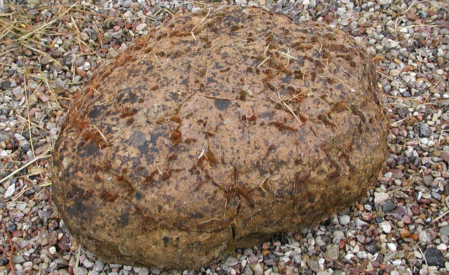 Ein Stein aus sand-/ kalkhaltigen Ablagerungen aus dem Hemmorium (vor 17 Mio Jahren)